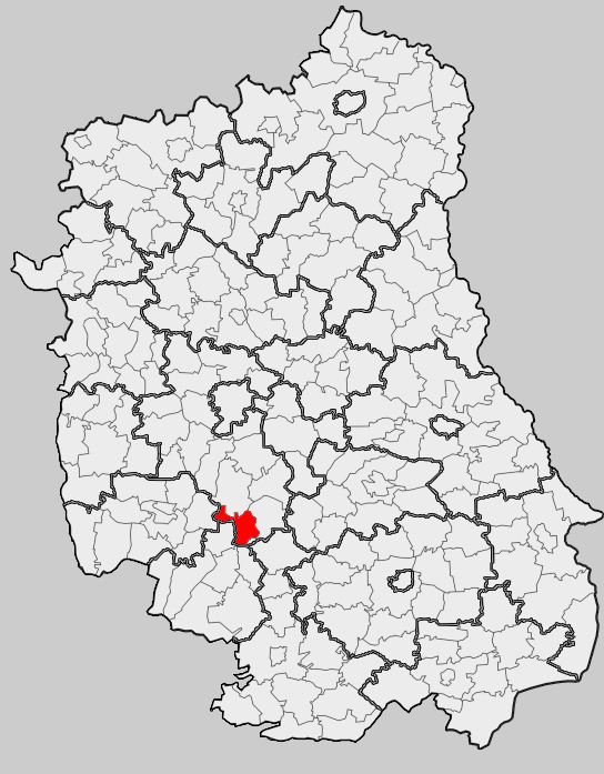 Map of gmina Zakrzew, Lublin county, Lublin voivodship Mapa gminy Zakrzew, powiat lubelski, województwo lubelskie